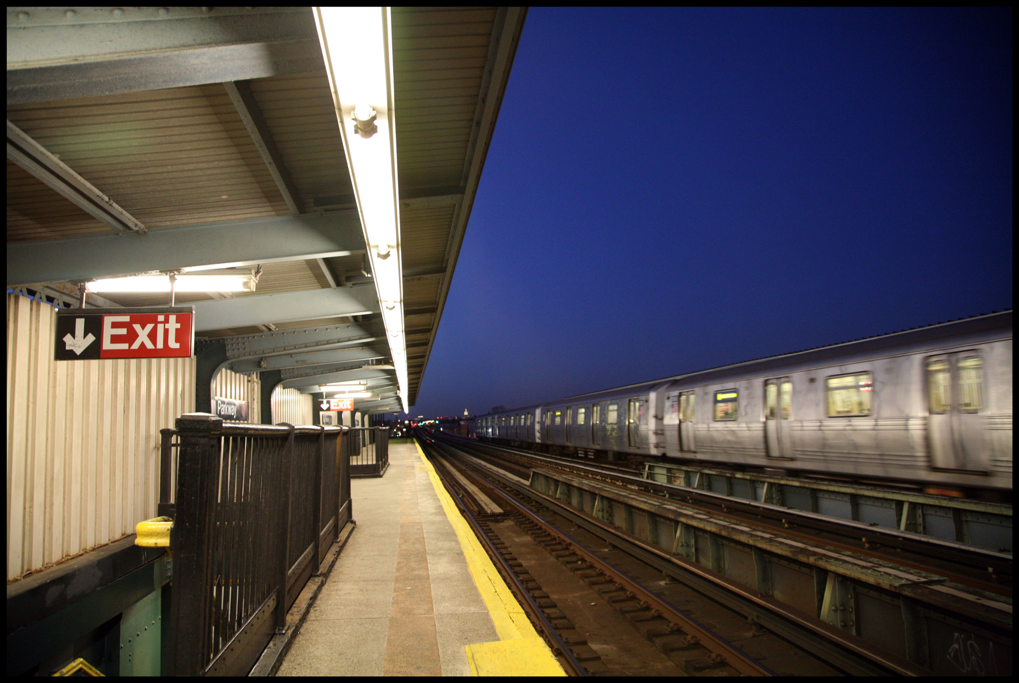 Subway